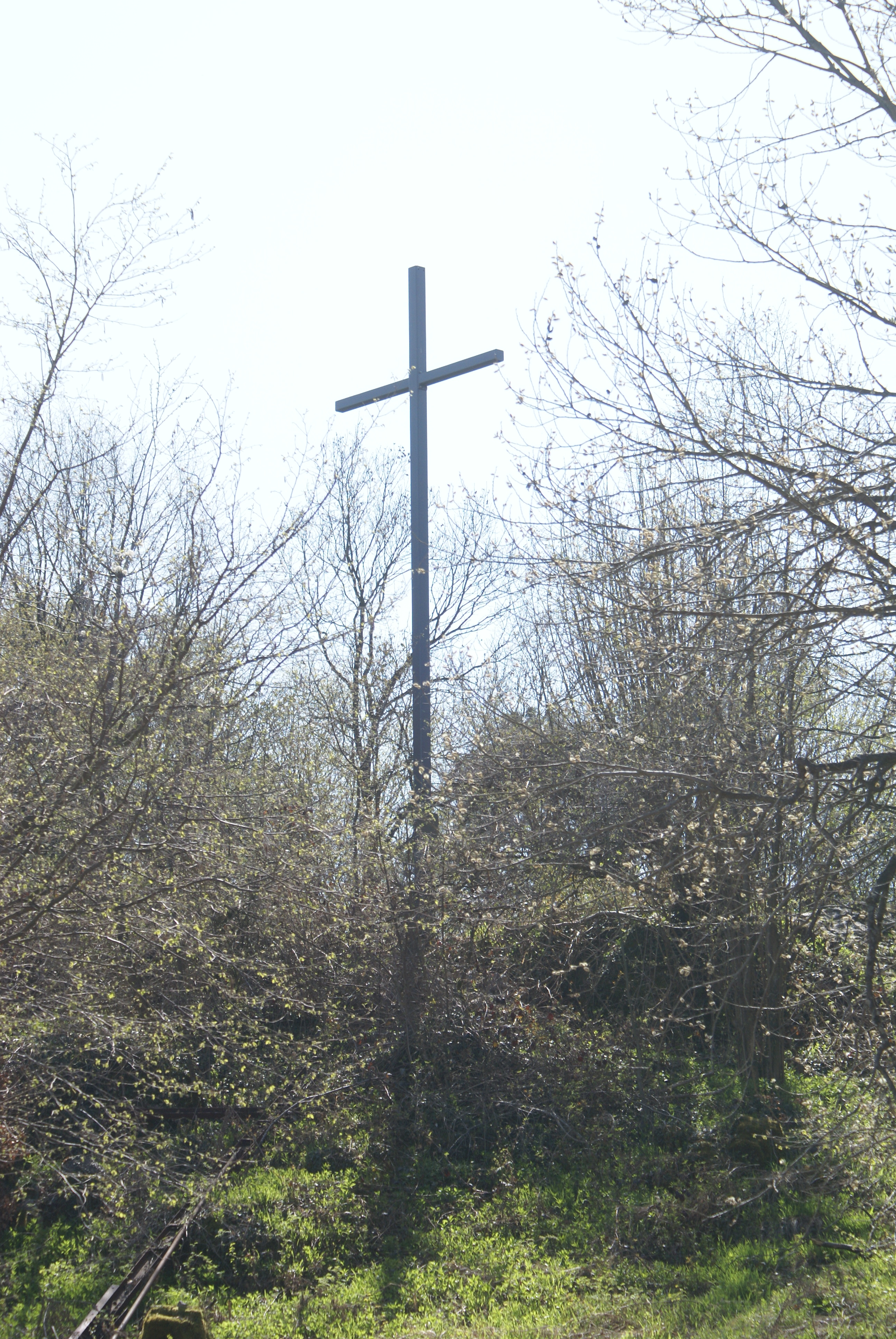 Jübergkreuz zur Erinnerung an das Stammlager VI A